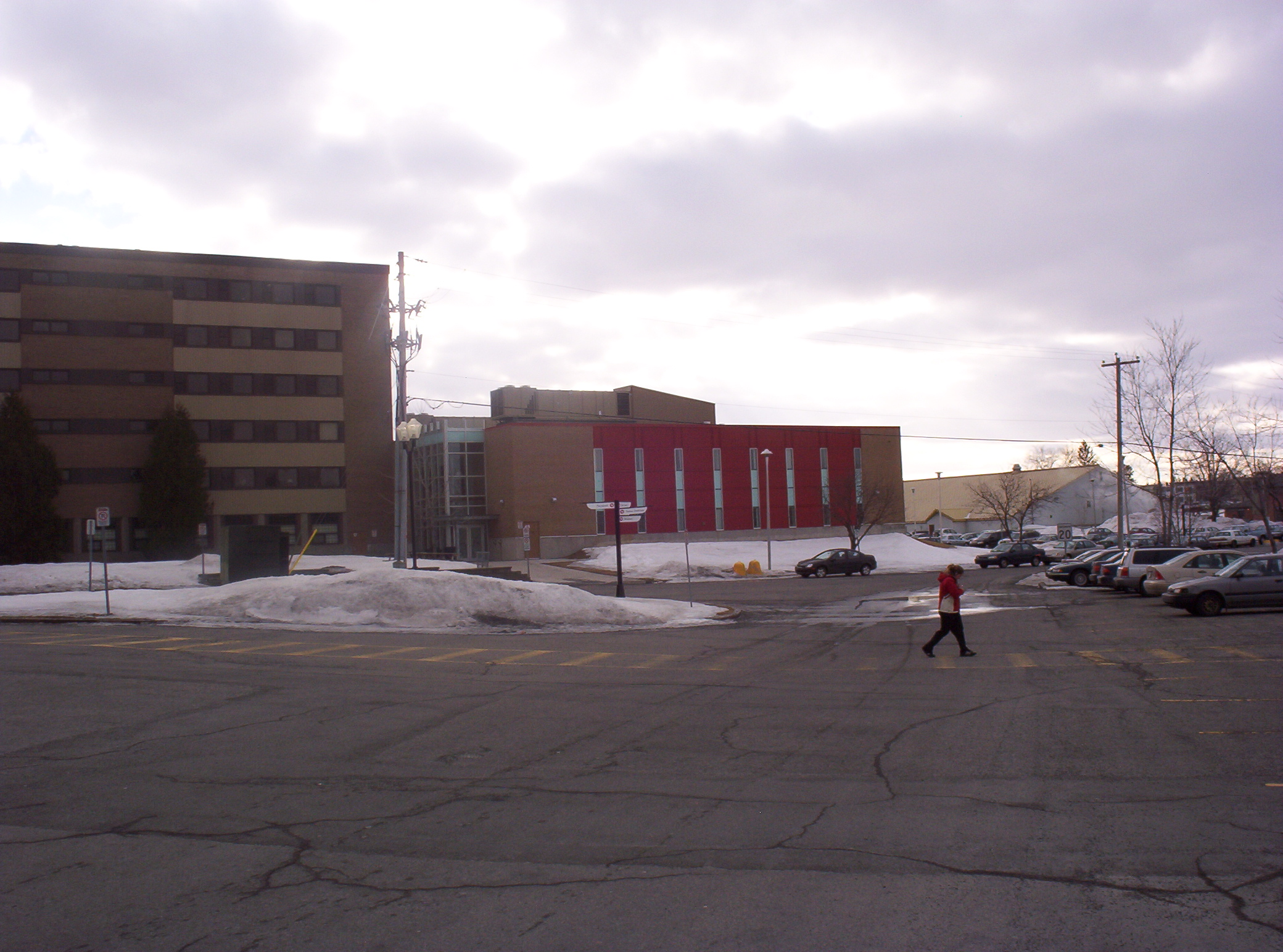 Pavillons du Collège Lionel-Groulx.